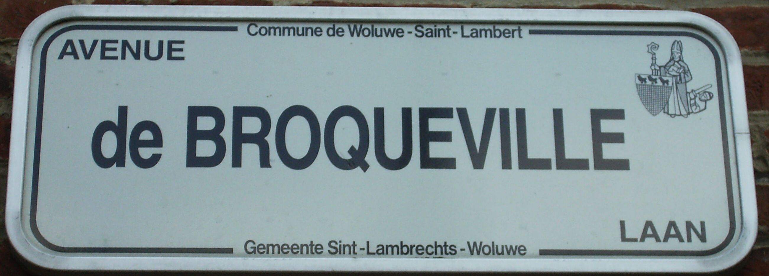 plaque de rue de Woluwe-Saint-Lambert Belgium